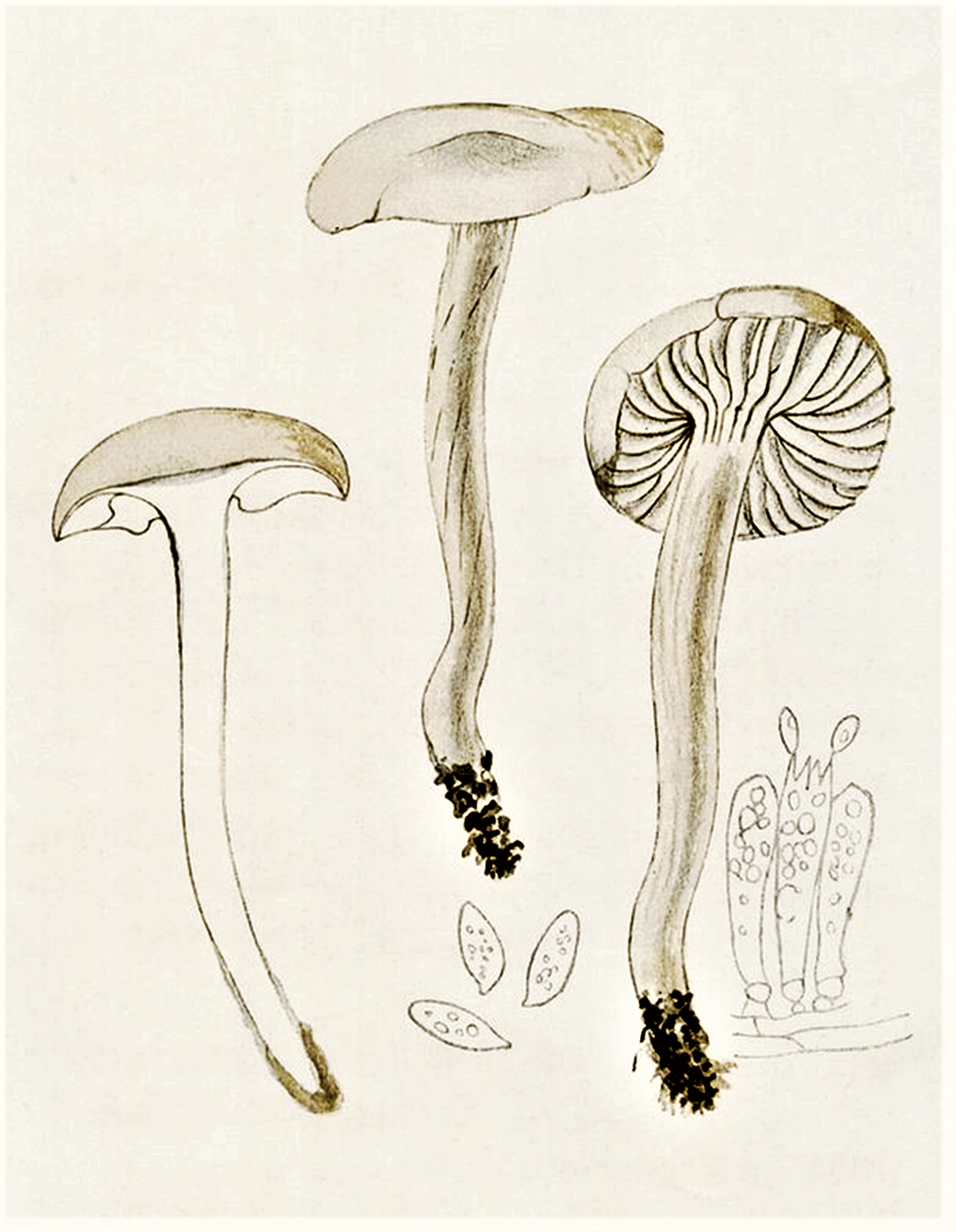 Giacomo Bresadola: Tricholoma inamoenum (Fr., 1815) Gillet (1878)